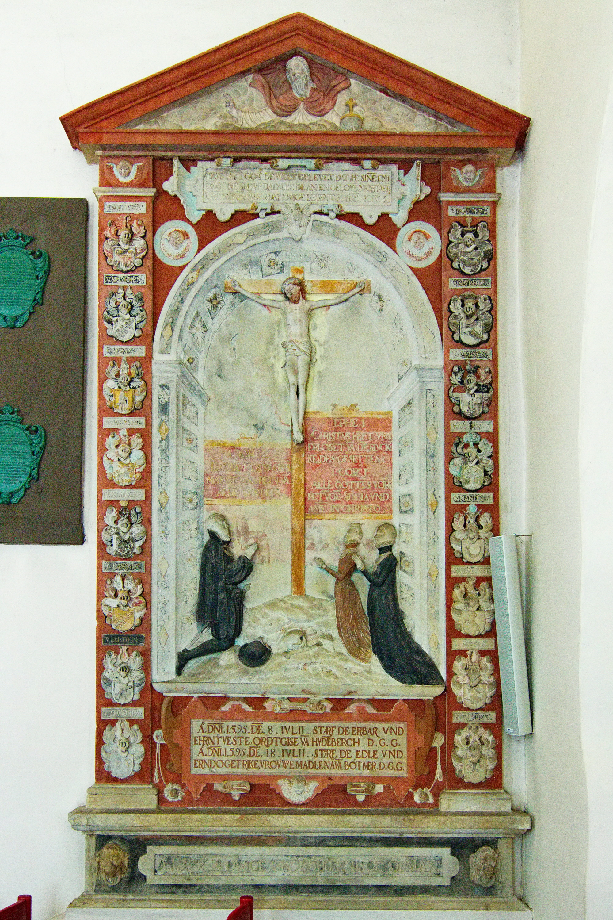 Die St. Thomas und Maria-Kirche wurde um 1300 als Burgkapelle errichtet und 1424 von der Familie von Hodenberg grundlegend erneuert und als Betkapelle genutzt. Das Foto stellt dar: Das Epitaph für Ortgies III. von Hodenberg zu Hodenhagen († 8. Juli 1595) und seine Ehefrau Magdalena geborene von Bothmer († 18. Juli 1595; Tochter des Joachim von Bothmer († 1587) und seiner ersten Ehefrau Elisabeth geb. von Glaubitz) in der St. Thomas und Maria-Kirche in Hodenhagen